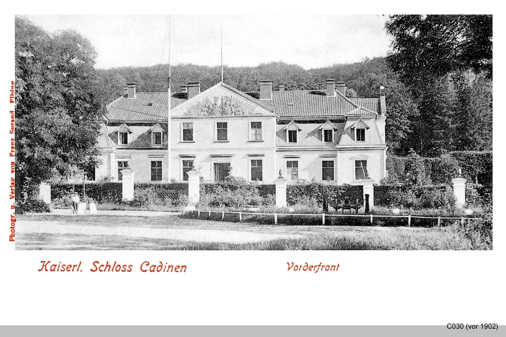 Pałac w KadynachHundegatt in Königsberg